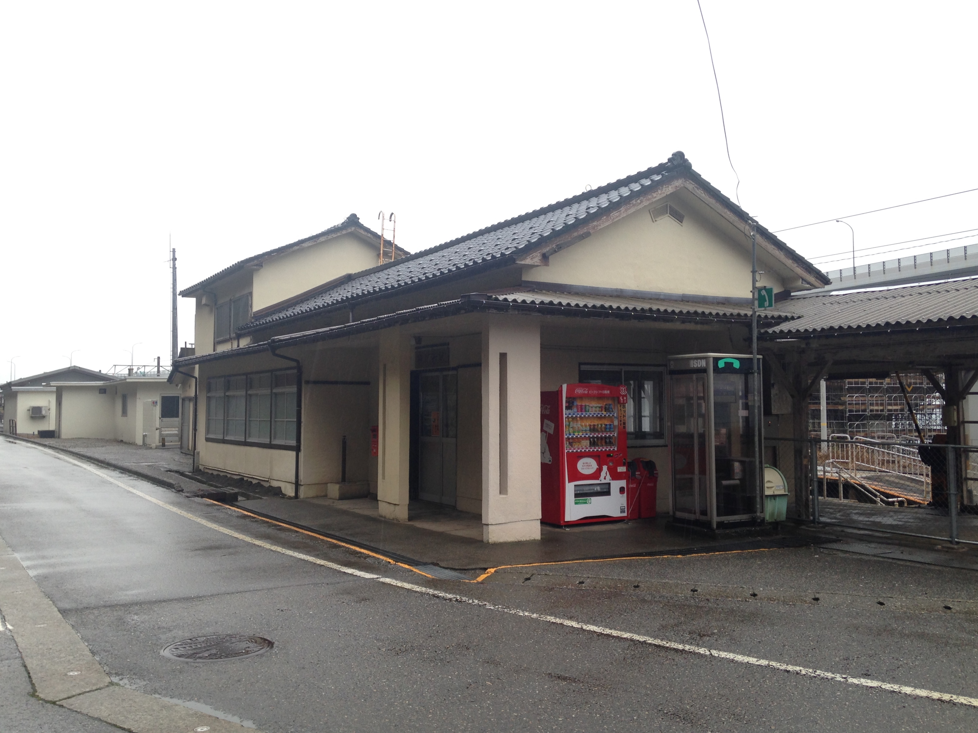 親不知駅駅舎